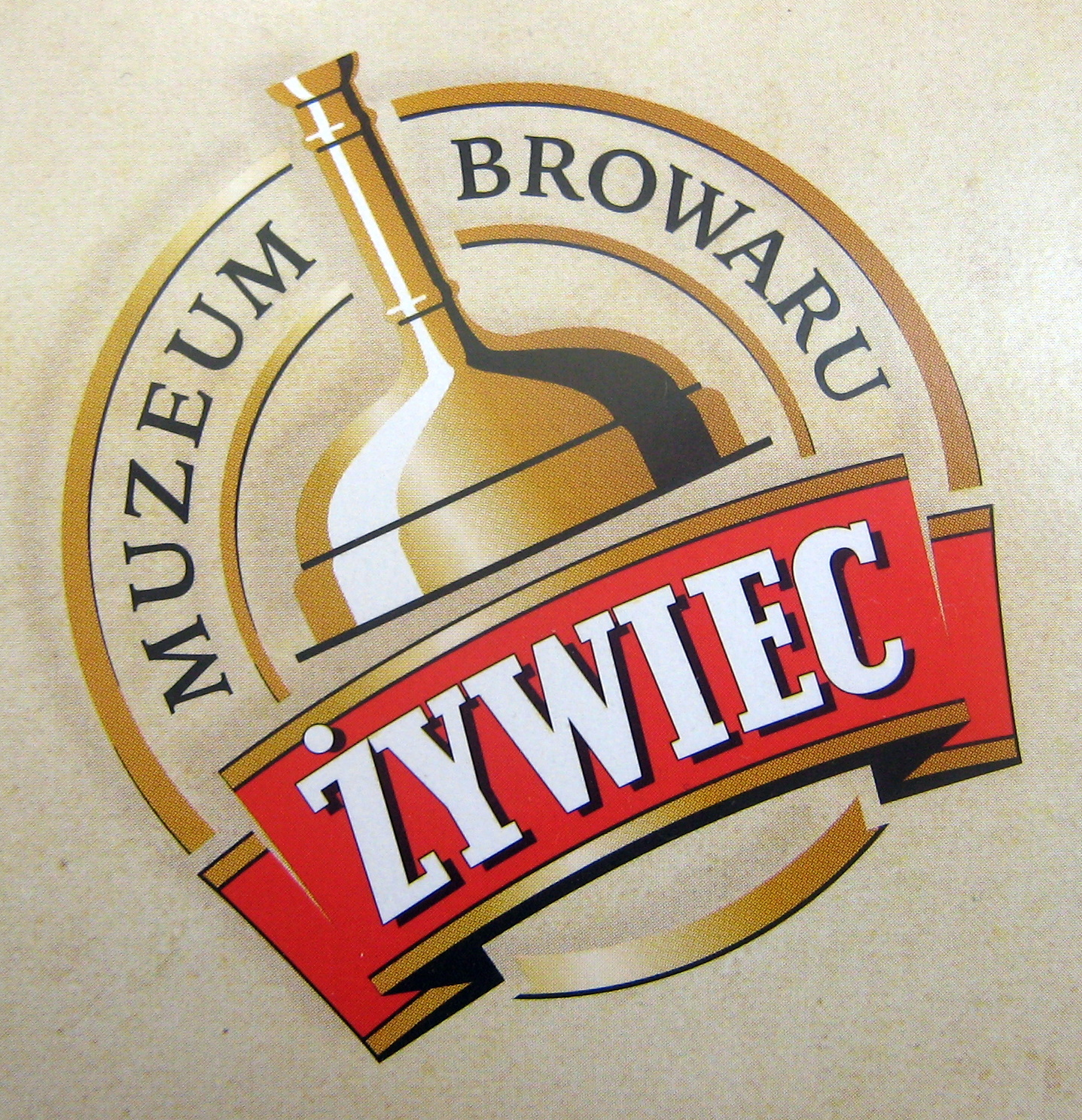 Logo z opakowania kartonowego firmowej szklanki